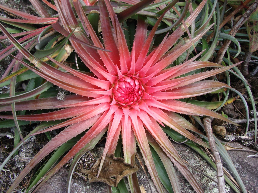 Orthophytum amoenum - BROMELIACEAE - Parque Nacional da Chapada Diamantina - Palmeiras - Bahia - Brasil.